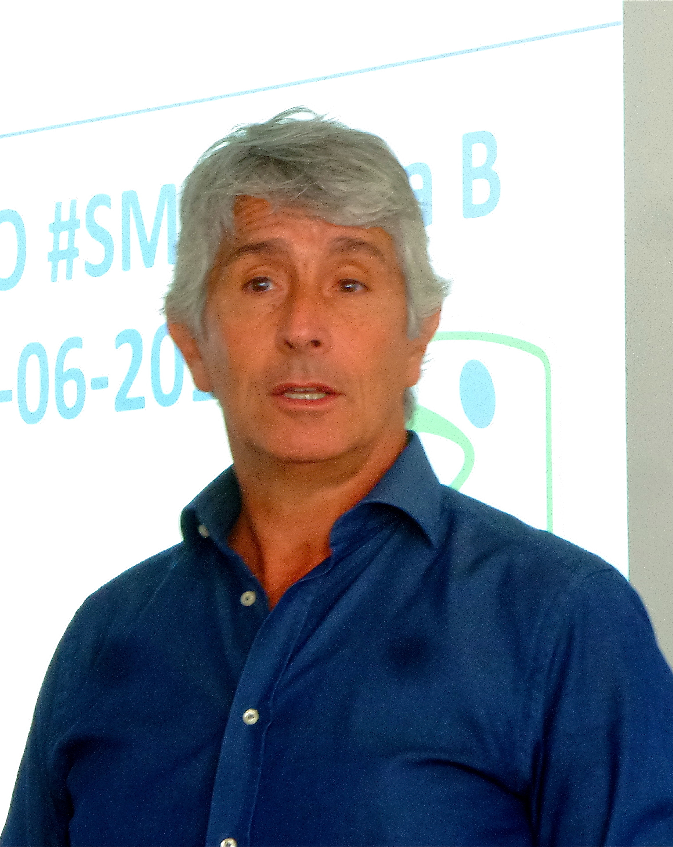 Andrea Abodi nel 2016 presso la sede di Lega B